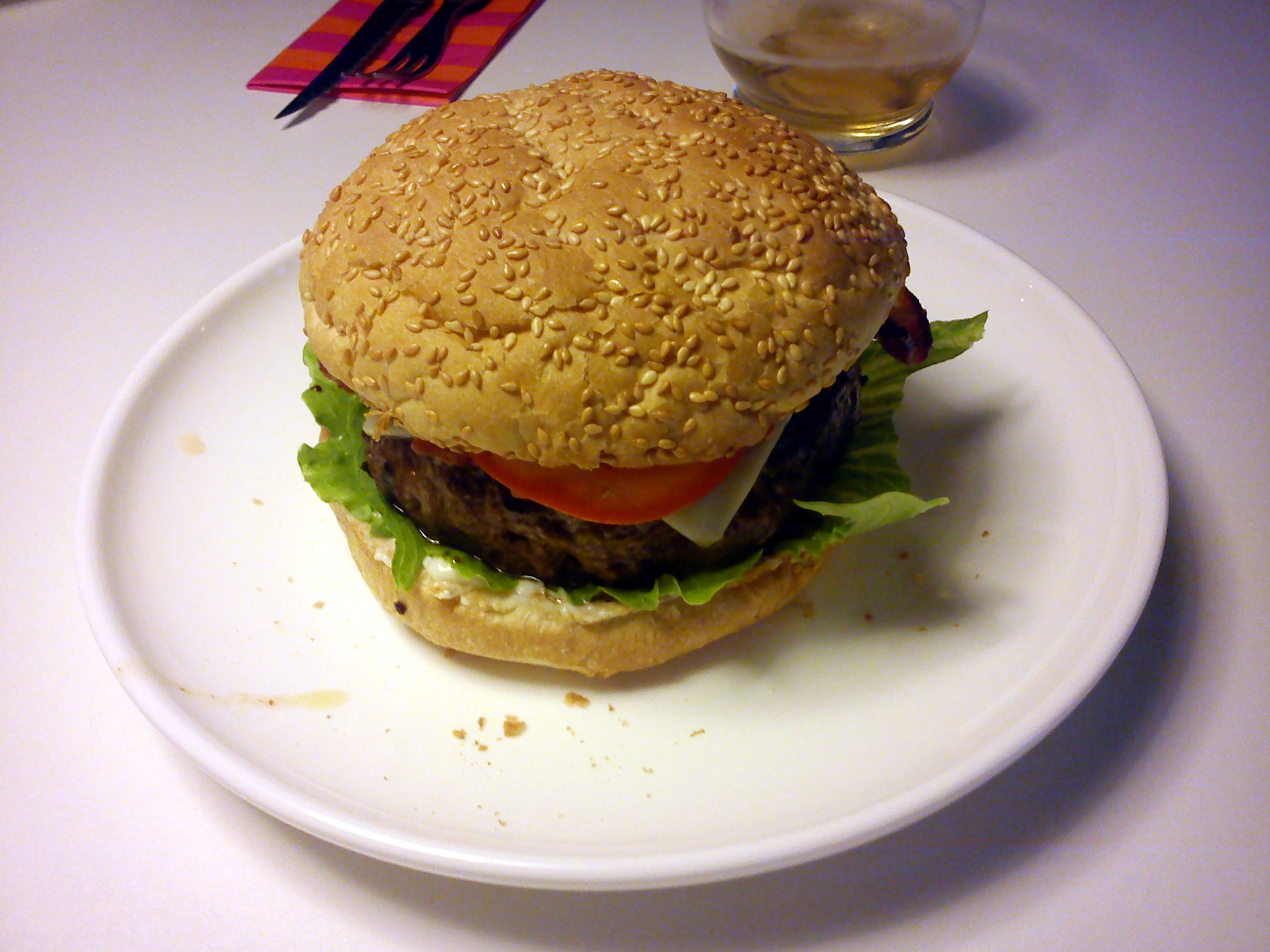 Burger